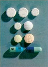 Quaalude-/Mandrax-Pillen